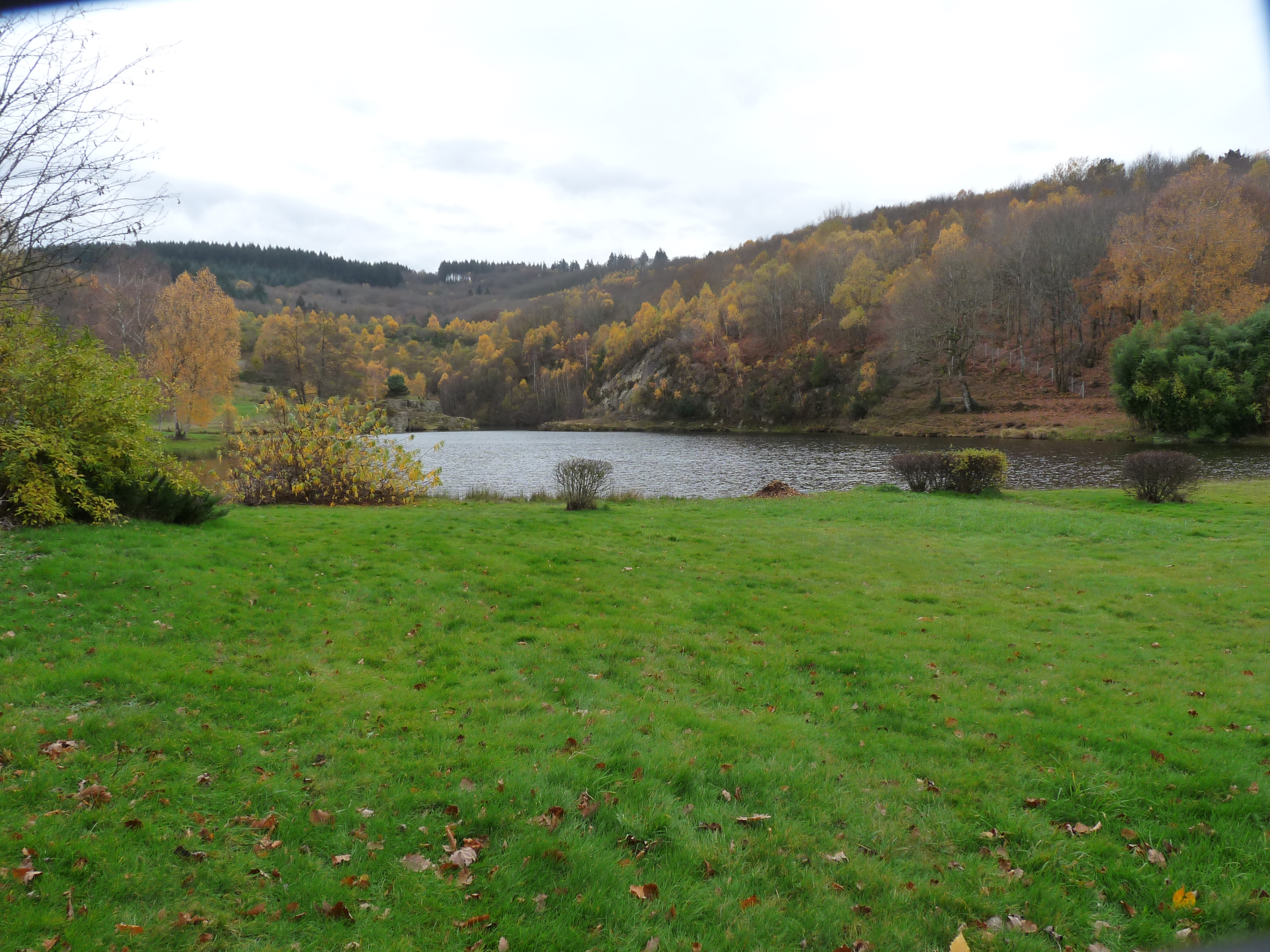 Lac du Puy de l'Age sur la commune de Bersac-sur-Rivalier qui occupe l'emplacement de l'ancienne mine d'uranium